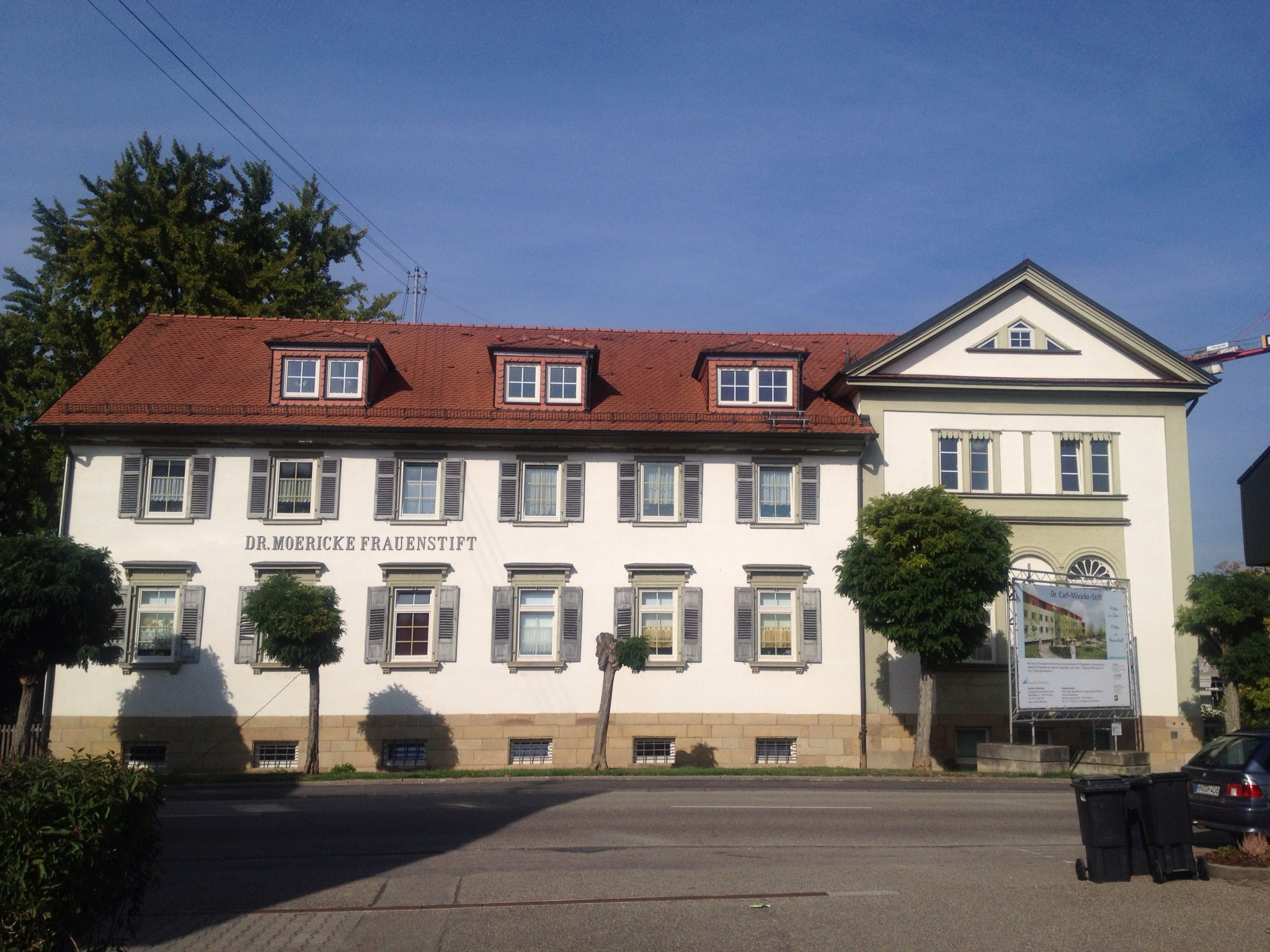 Historisches Hauptgebäude des Mörickstifts in Neuenstadt am Kocher